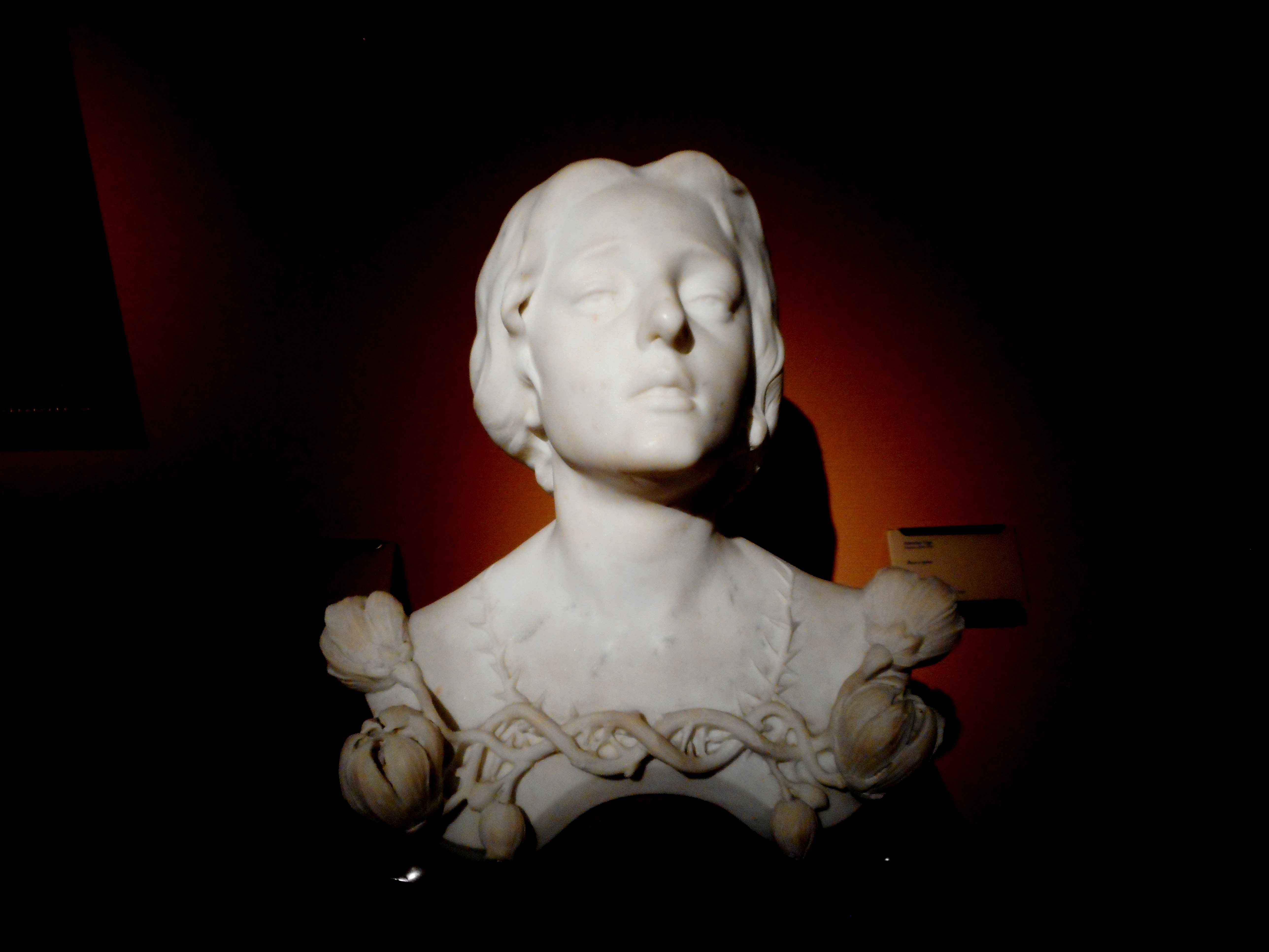 Rosa e spine - opera di Antonio Ugo alla Galleria Comunale d'Arte Moderna di Palermo